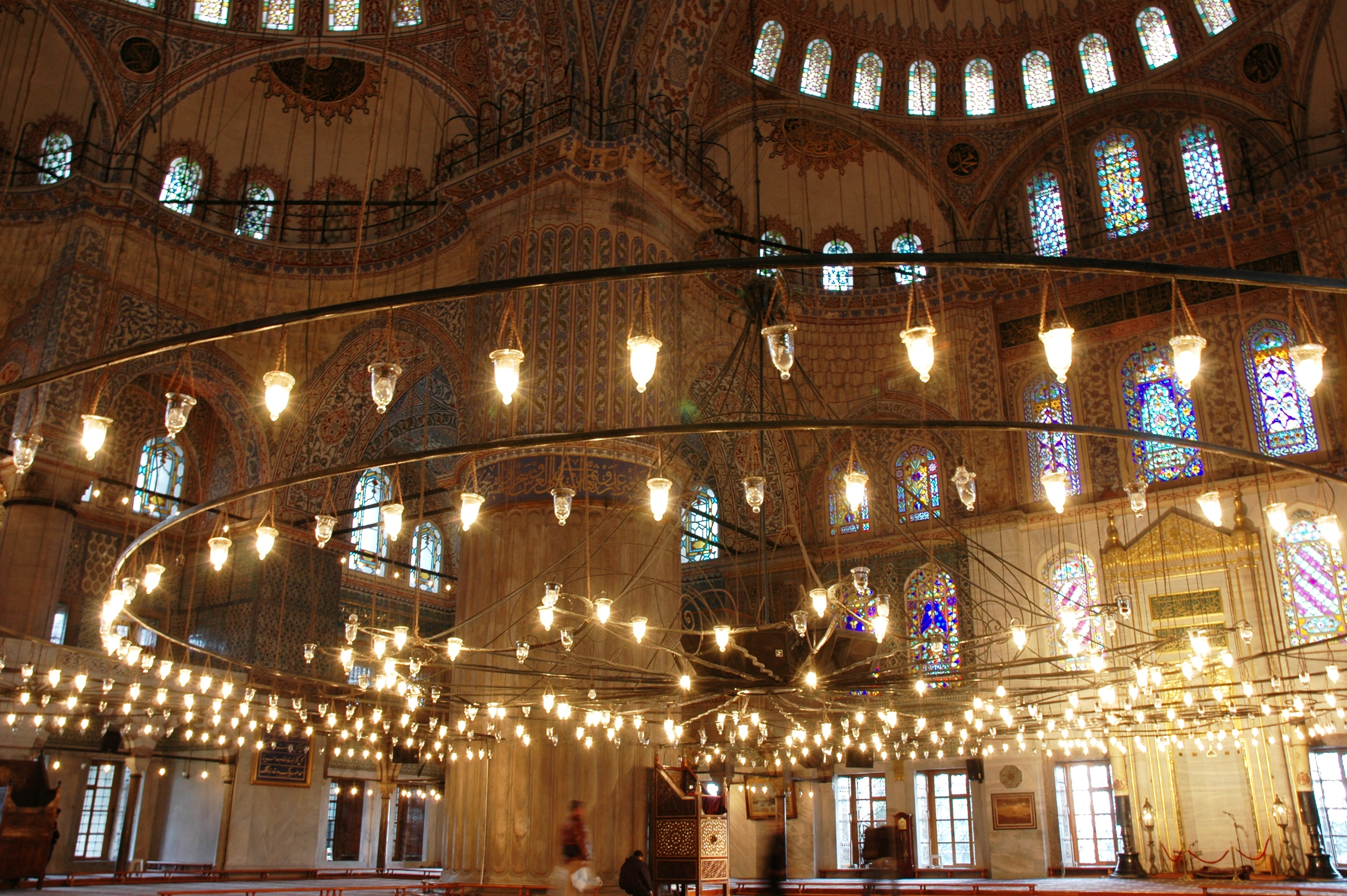 Istanbul - Mesquita blava - Llums d'oli